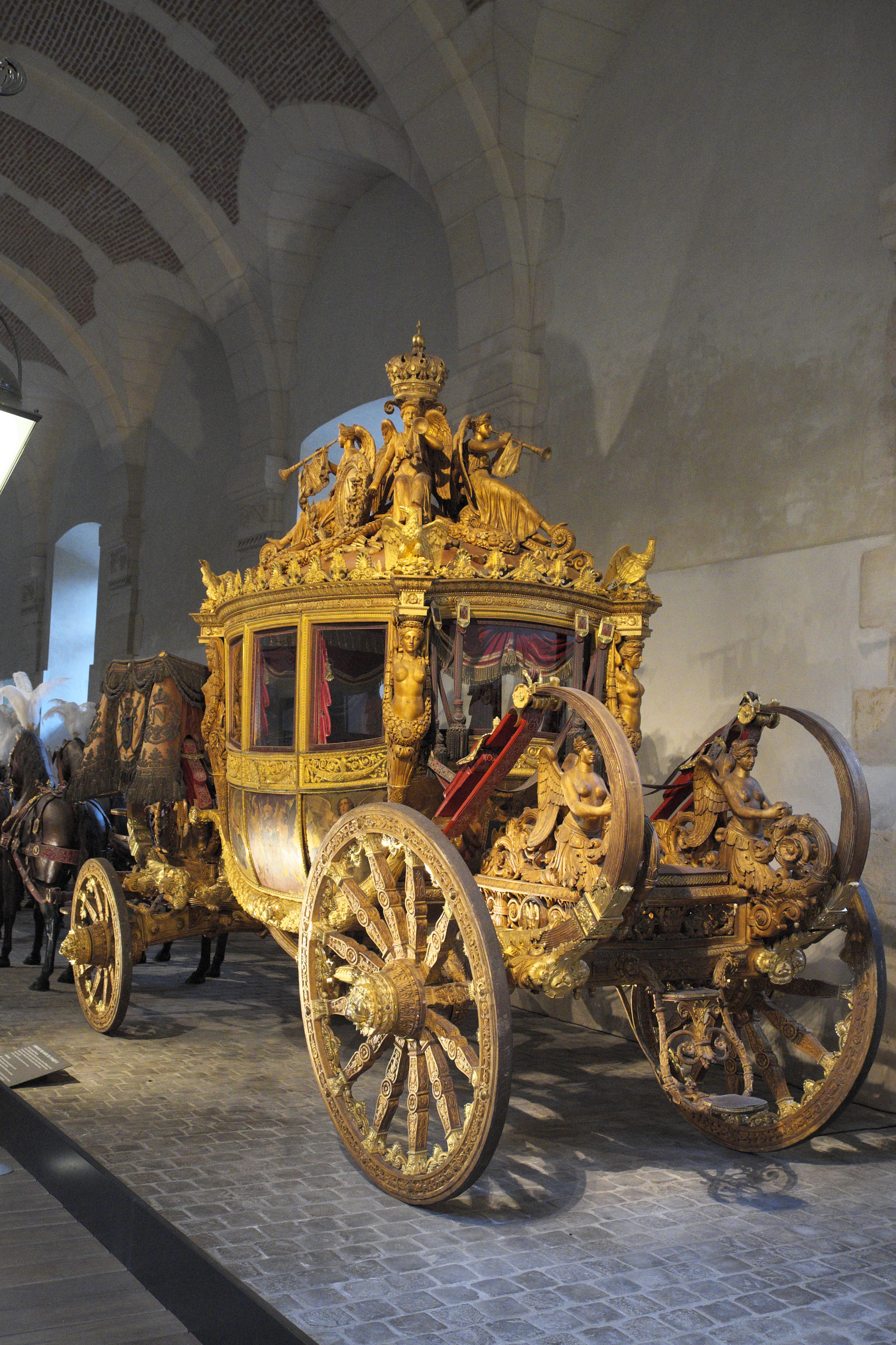 Kutschenmuseum, Galerie des Carosses, in der Grande Écurie des Schlosses von Versailles im Département Yvelines (Region Île-de-France/Frankreich), Kutsche für die Krönung von Karl X.